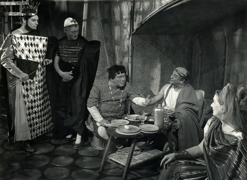 Friedrich Dürrenmatt, Romulus Veliki, Drama SNG v Ljubljani. Na fotografiji: Boris Kralj (Zenon Izavrijski), Maks Furijan (Tullius Rotundus), Pavle Kovič (Cezar Rupf), Stane Sever (Romulus Augustus), Sava Sever (Julija).